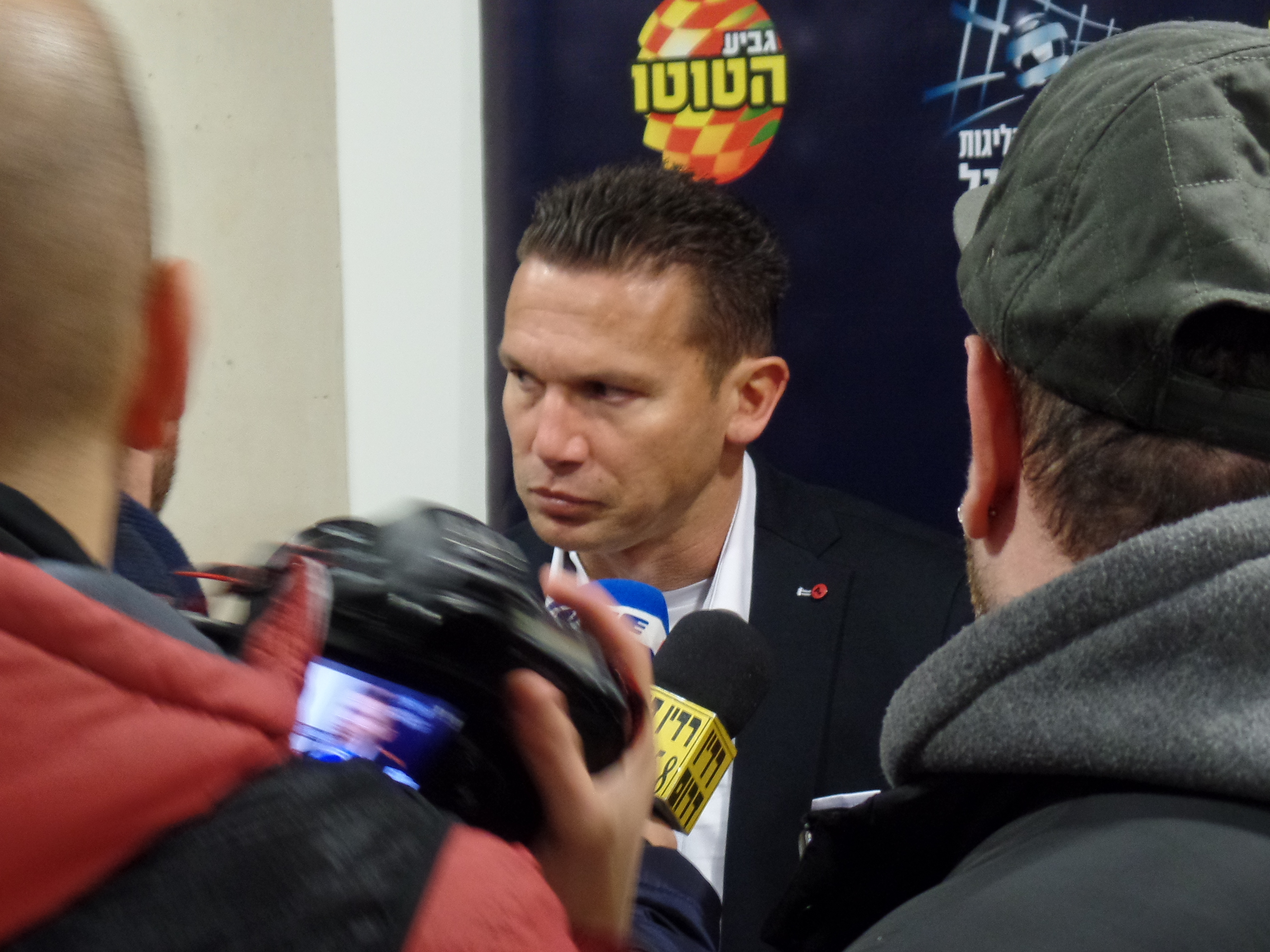 ברק בכר בראיון לתקשורת 2016